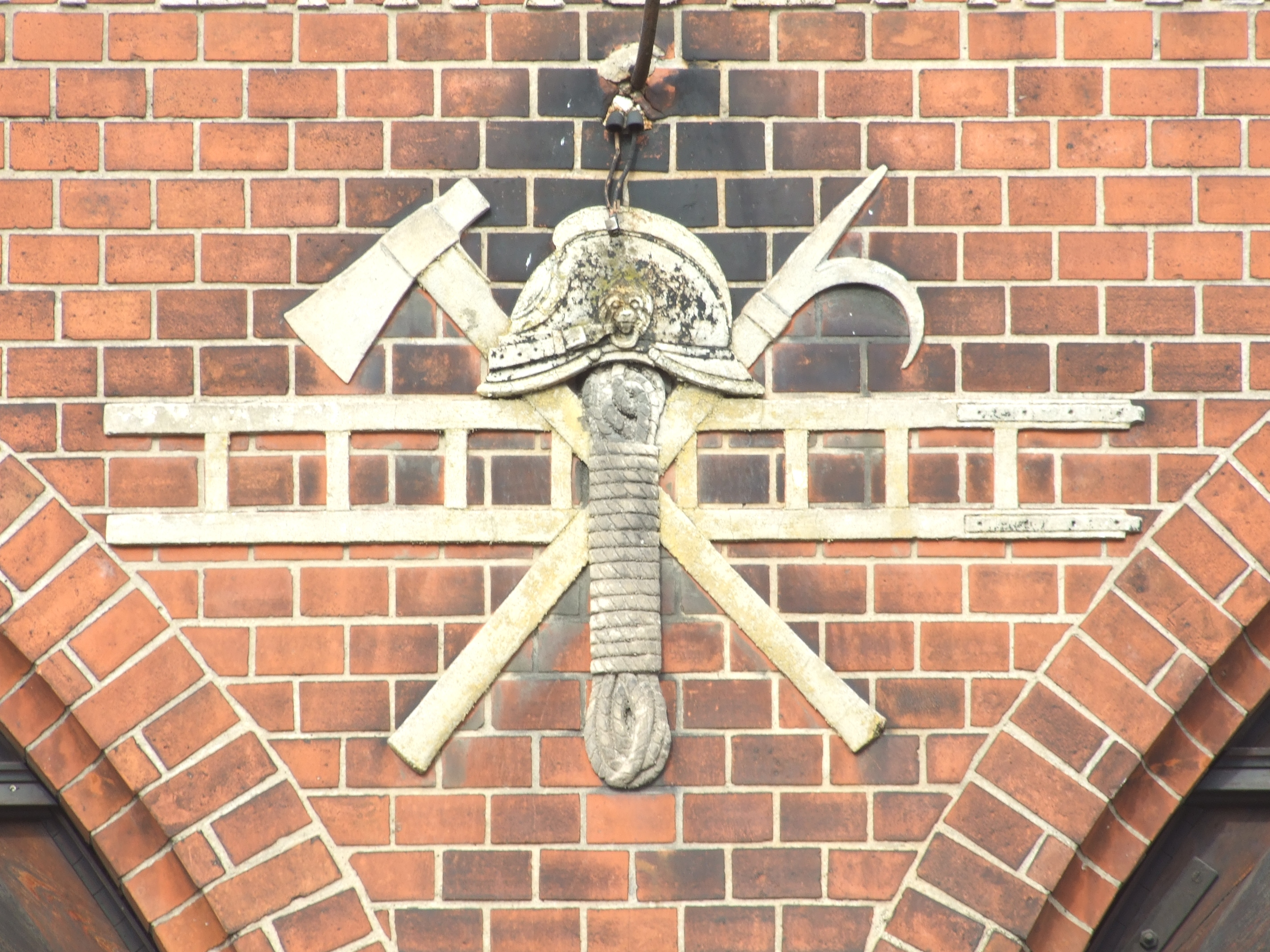 Herne, Stöckstraße 34, Detail